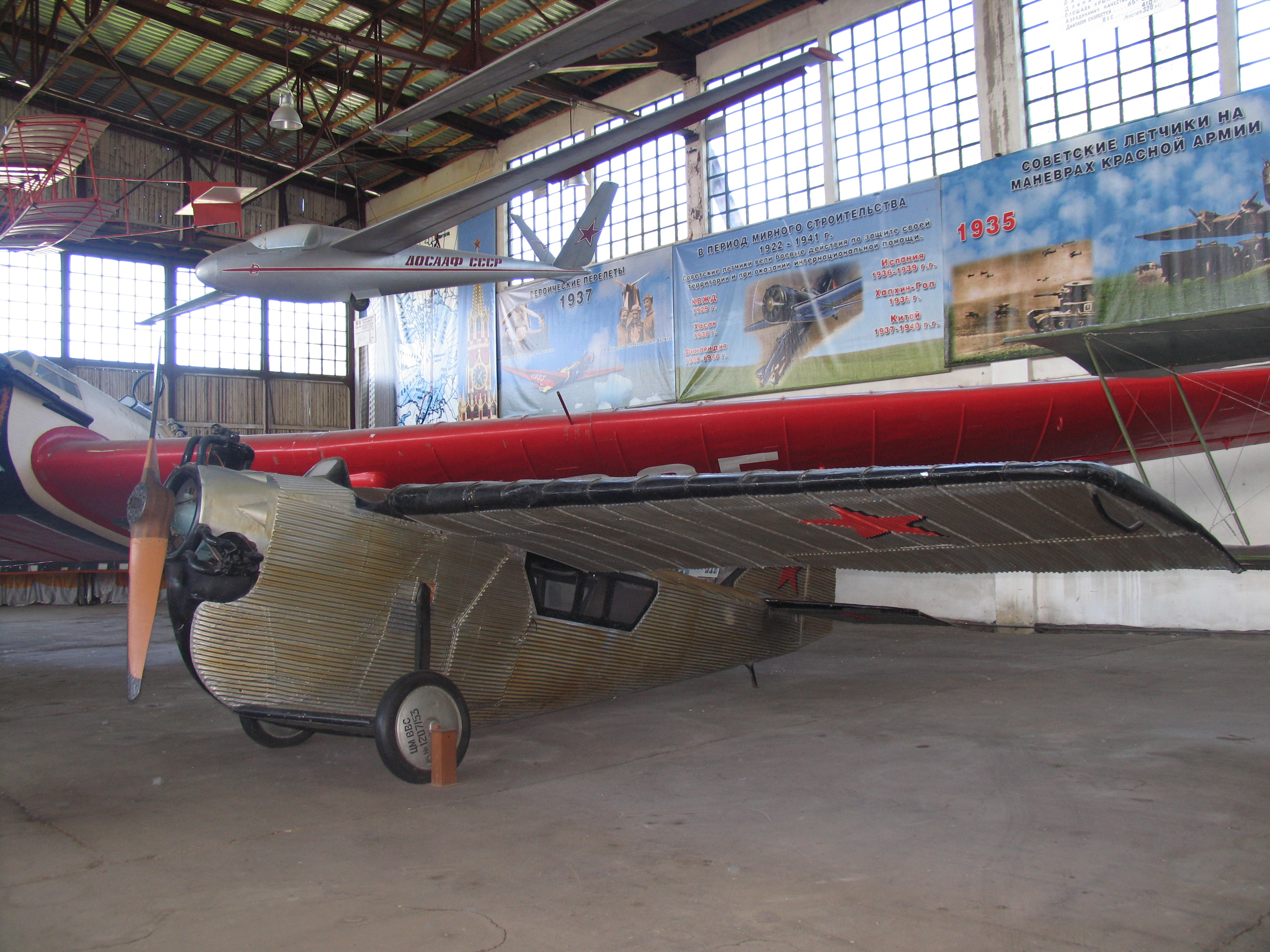 Первый лётный АНТ-2. Изготовлен в мае 1924 года. Первый полёт 26 мая 1924 года. В музей передан 11 октября 1960 года.